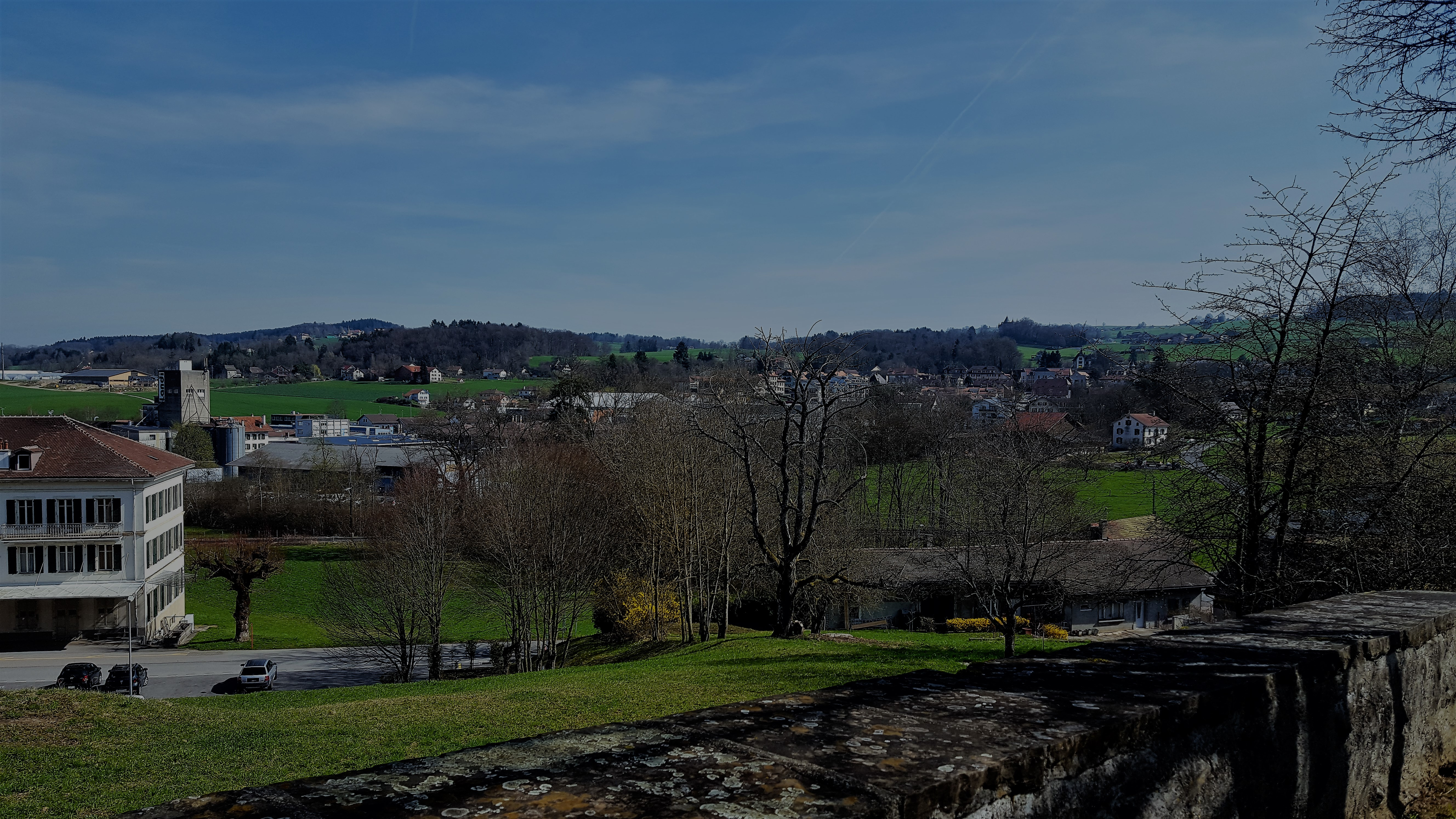 Blick auf Chatillens von der Kirche Saint-Maurice